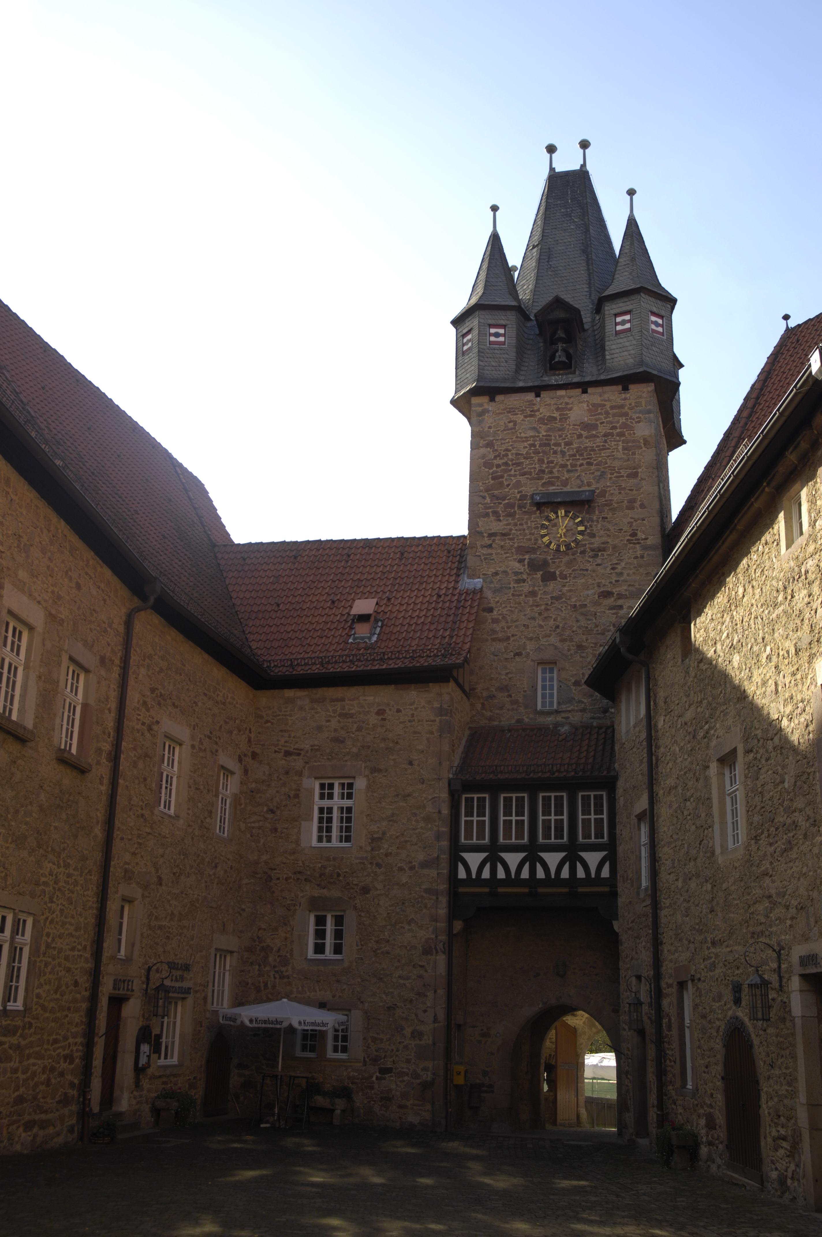 Burg Spangenberg, Hessen